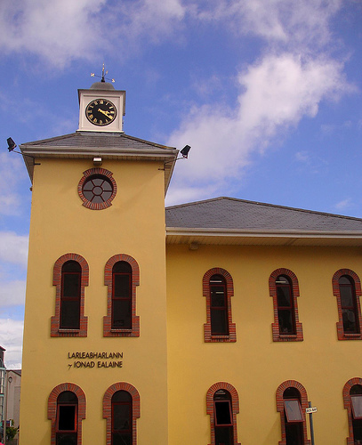 Letterkenny Library